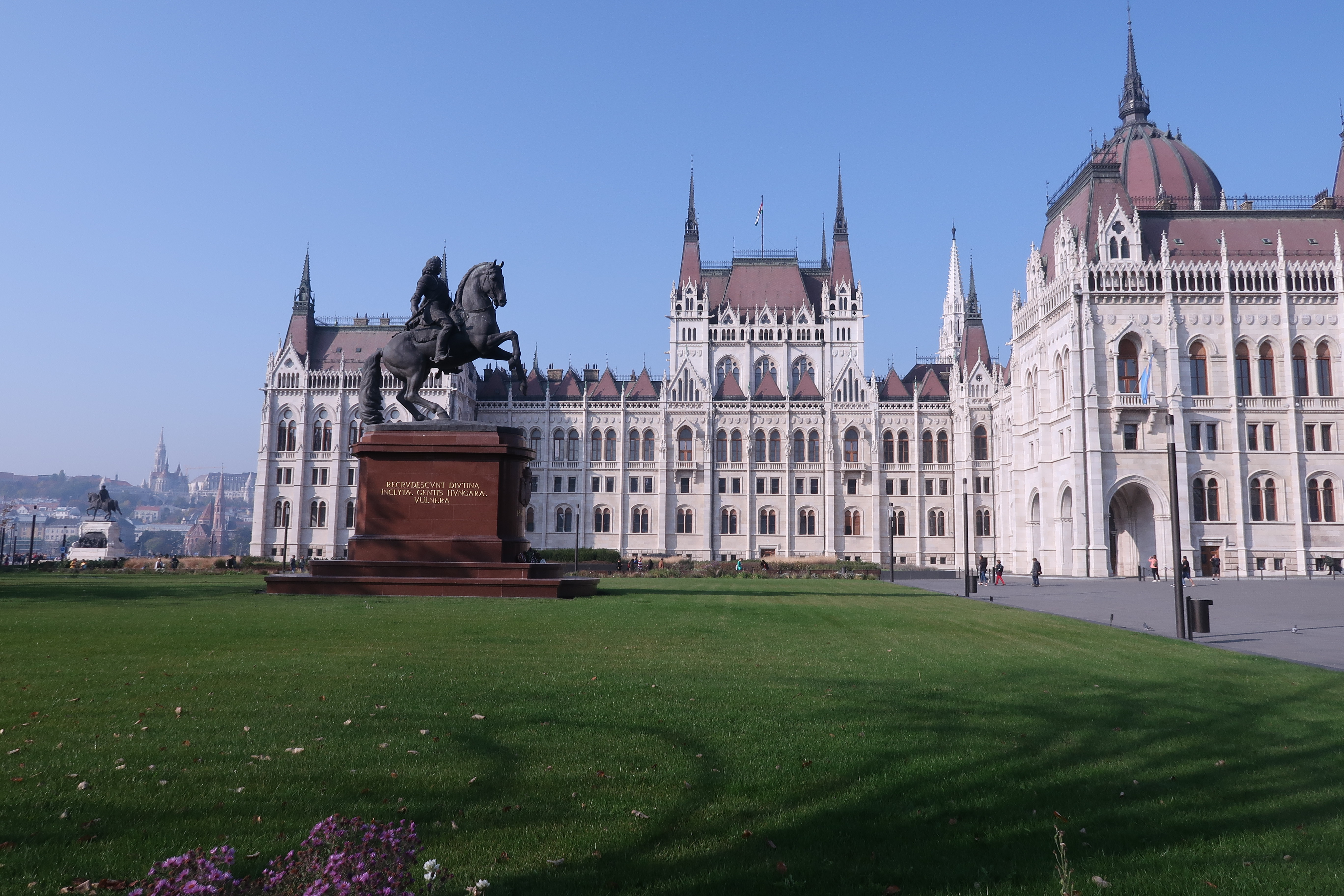 Kossuth Lajos ter, pohled na sochu Ference II. Rákocziho